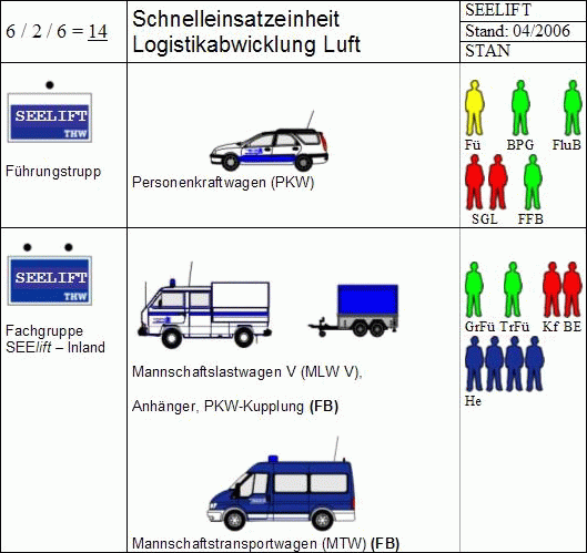 StAN des Technisches Hilfswerk über Fahrzeuge der Schnelleinsatzeinheit Logistikabteilung Luft